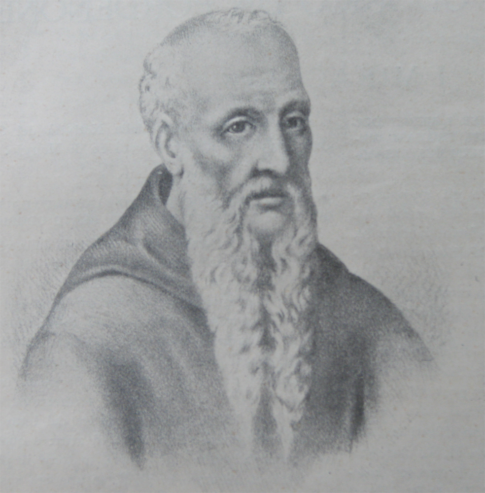 Rysunek przedstawiający bł. Odoryka z Pordenone z 1800 roku